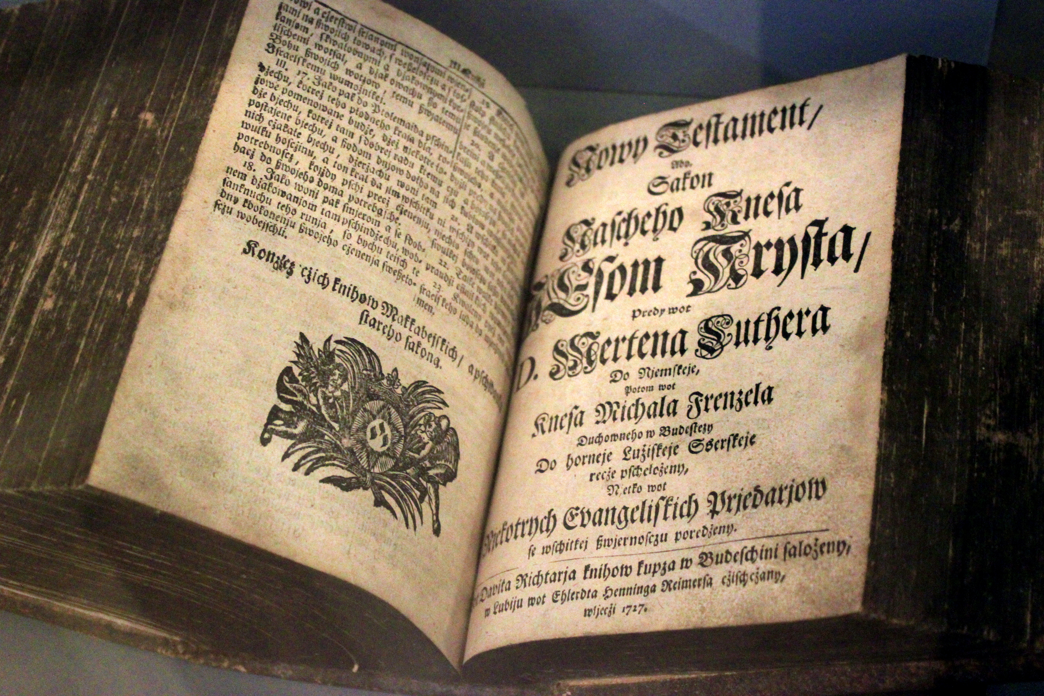 Hornjoserbsce: Frenclowy přełožk Noweho zakonja w Serbskim muzeju, Budyšin.